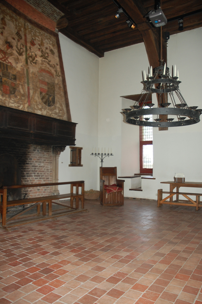 De woonkamer van het Slot, met de heen-en-weer-bank.